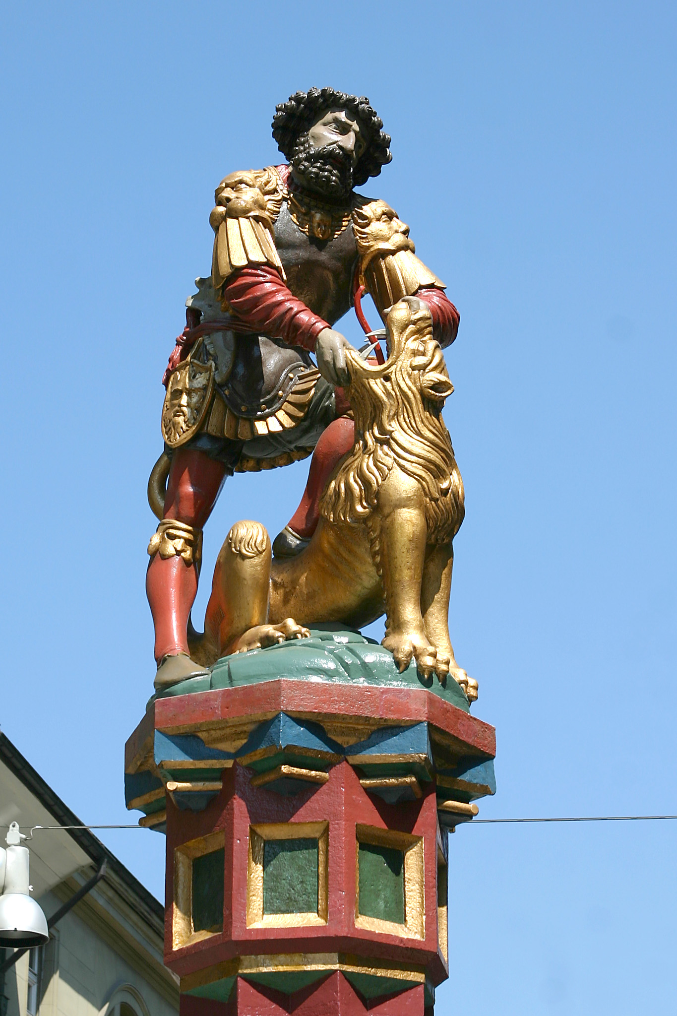 Simsonbrunnen, Bern, Switzerland